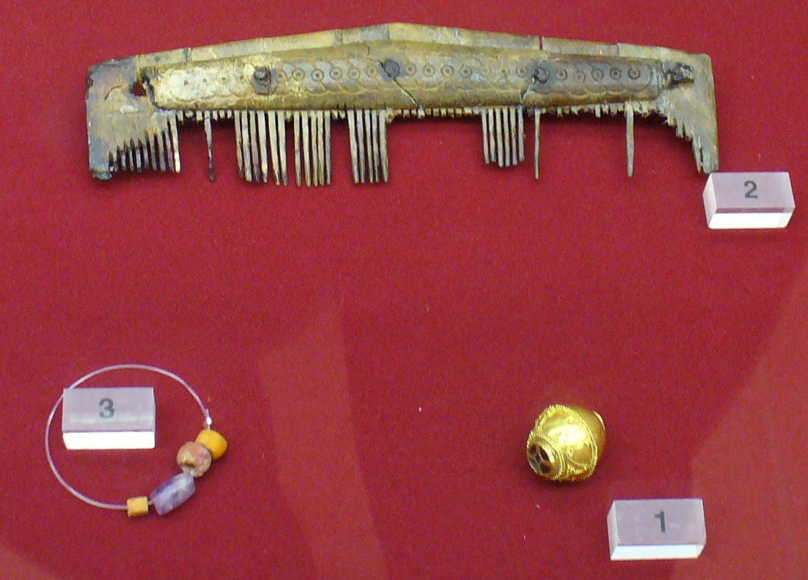 Lahr, Burgheimer Kirche, grave find